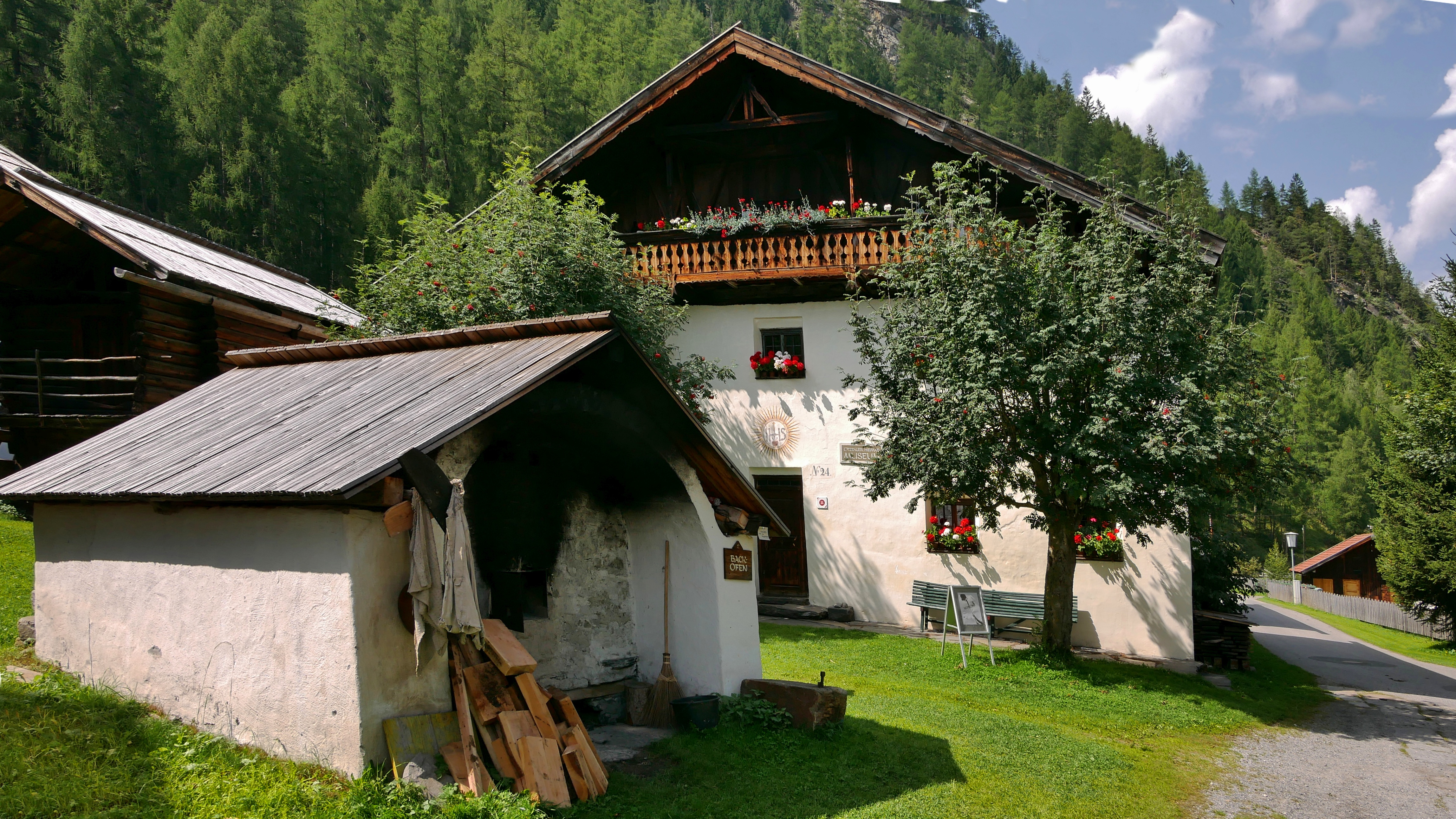 Ötztaler Freilichtmuseum, Längenfeld Ötztal/Tirol - Backhaus und Wohnhaus